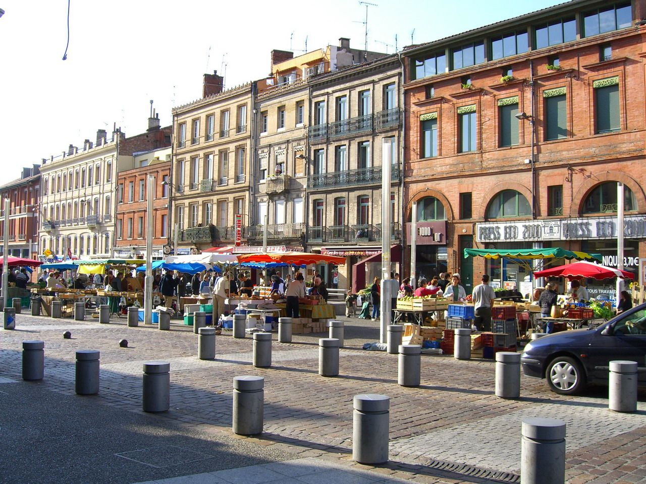 Vue du marché sur la Place Arnaud Bernard à Toulouse (Haute-Garonne, France).